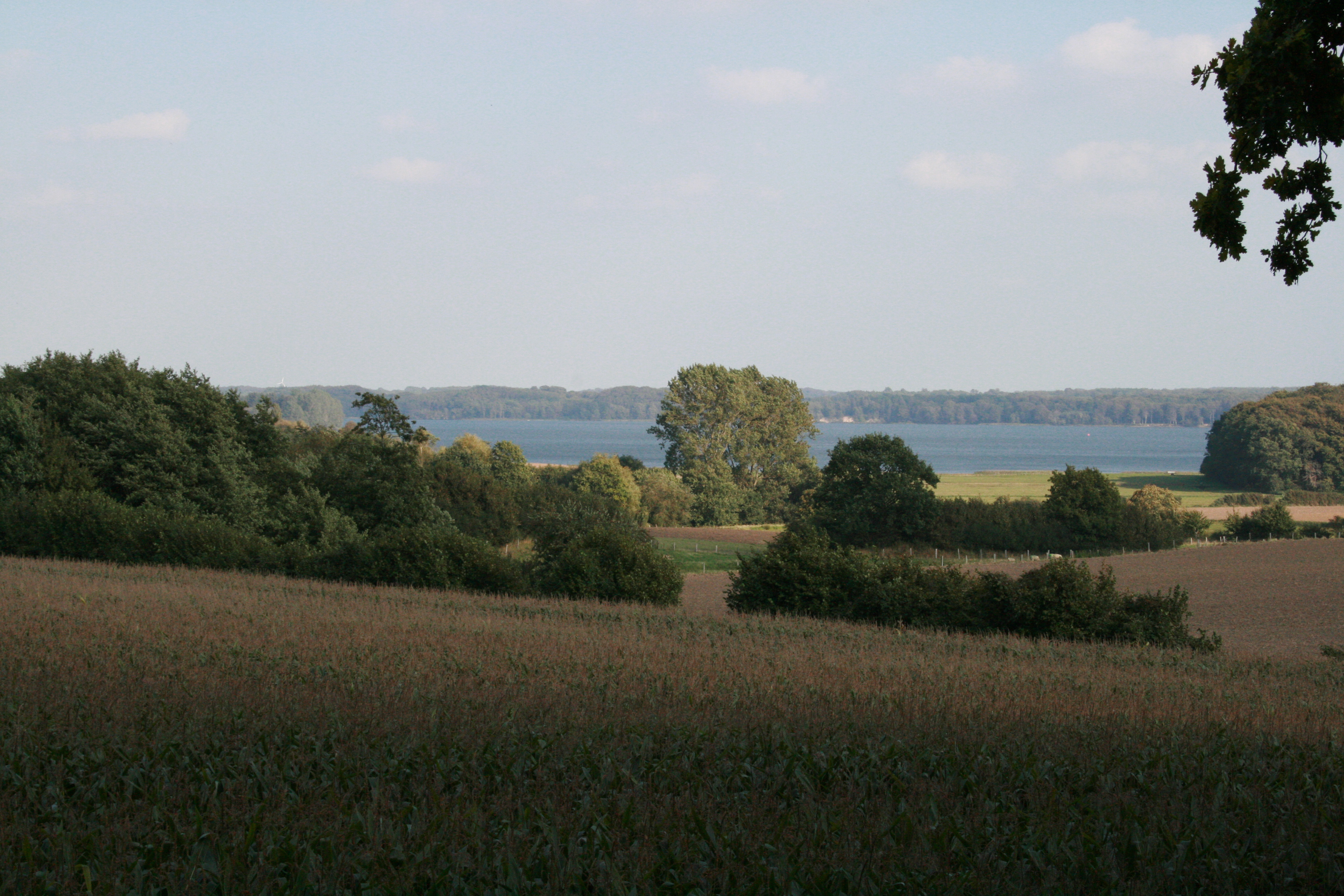 Aussicht auf die Schlei vom hölzerner Glockenturm (Glockenstapel)in Ulsnis